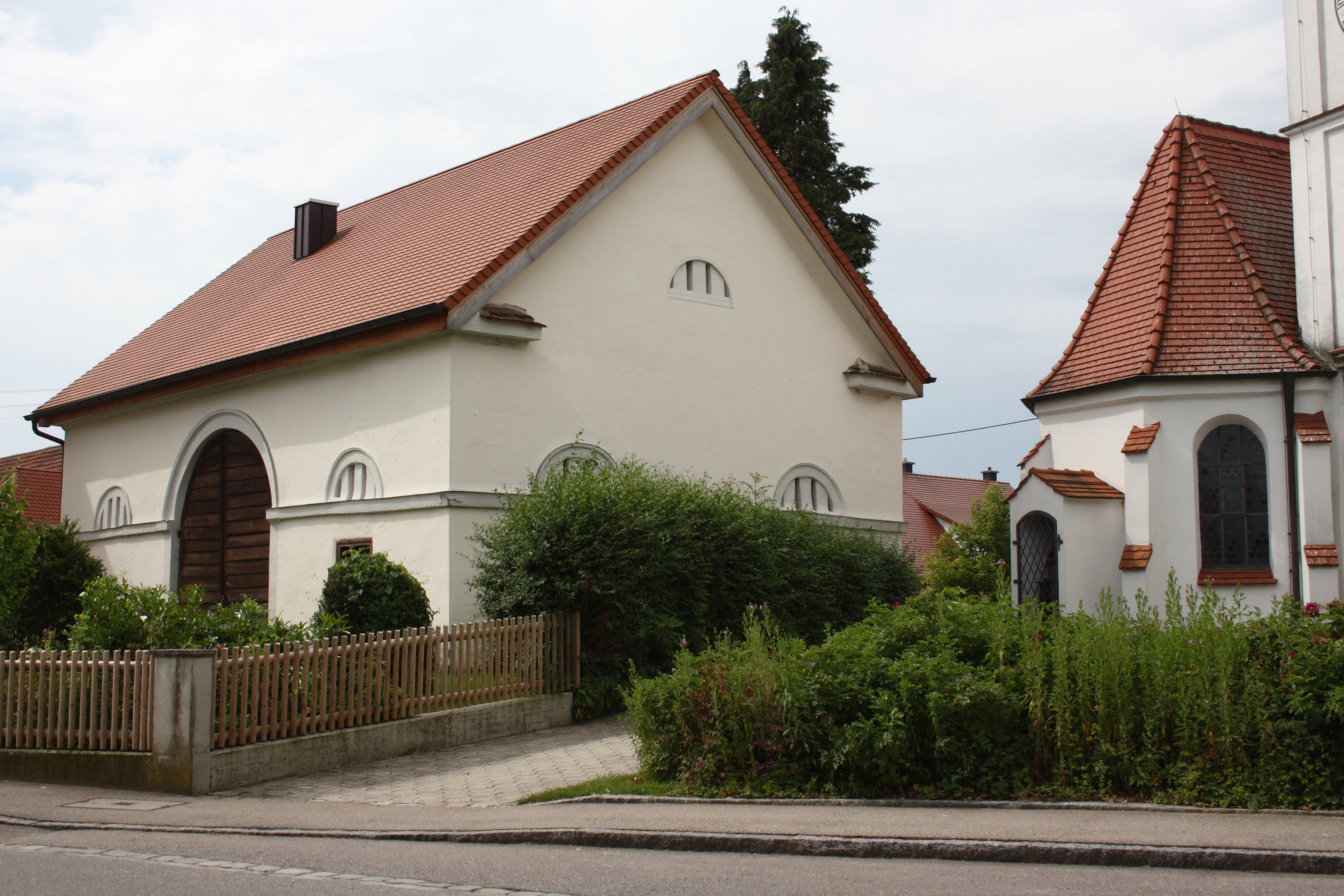 Pfarrstadel in Zusamzell, einem Ortsteil von Altenmünster im Landkreis Augsburg (Bayern), St.-Nikolaus-Straße 30, Satteldachbau um 1860